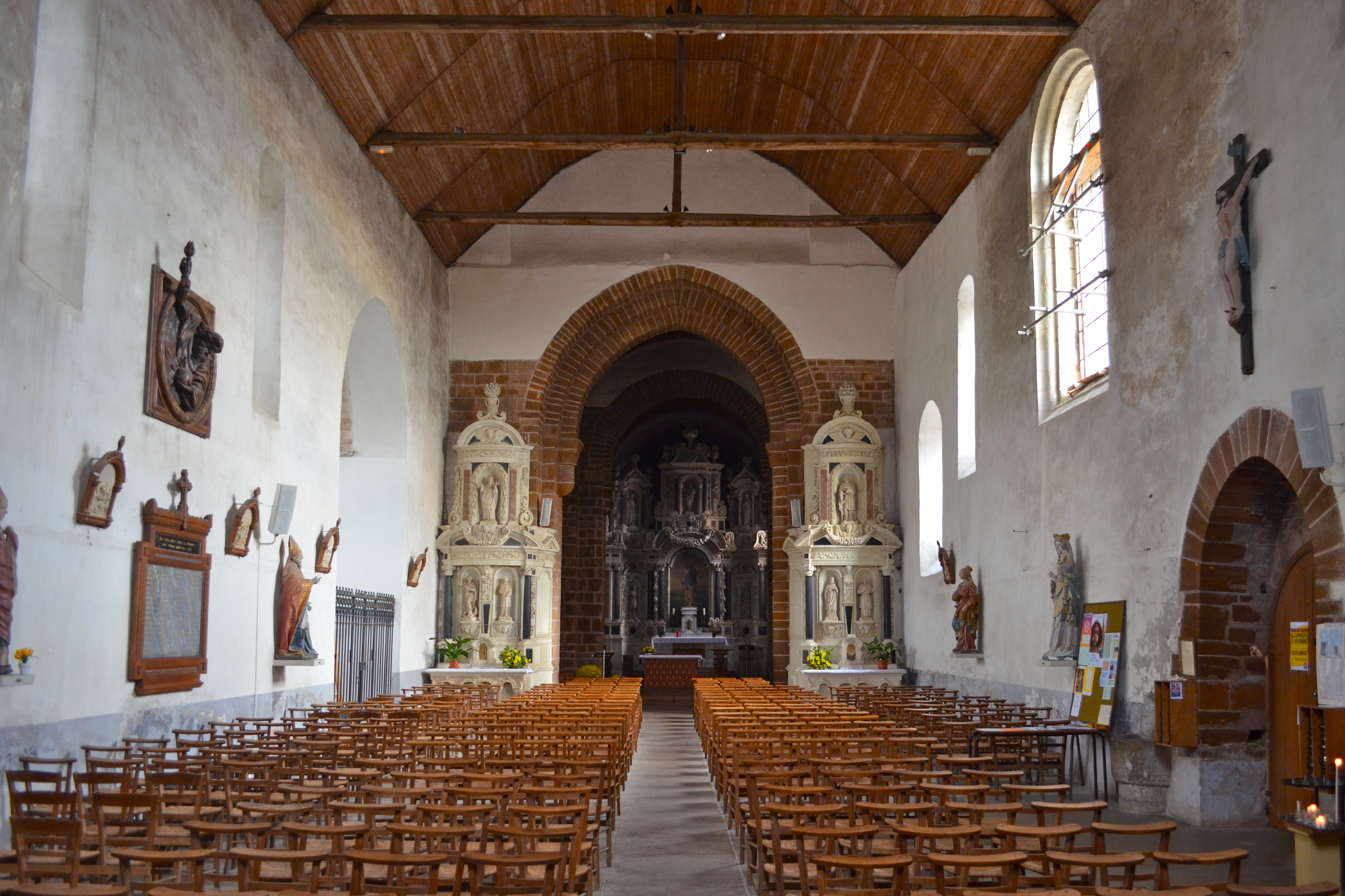 Eglise Saint-Jean de Béré - Châteaubriant (Loire-Atlantique)